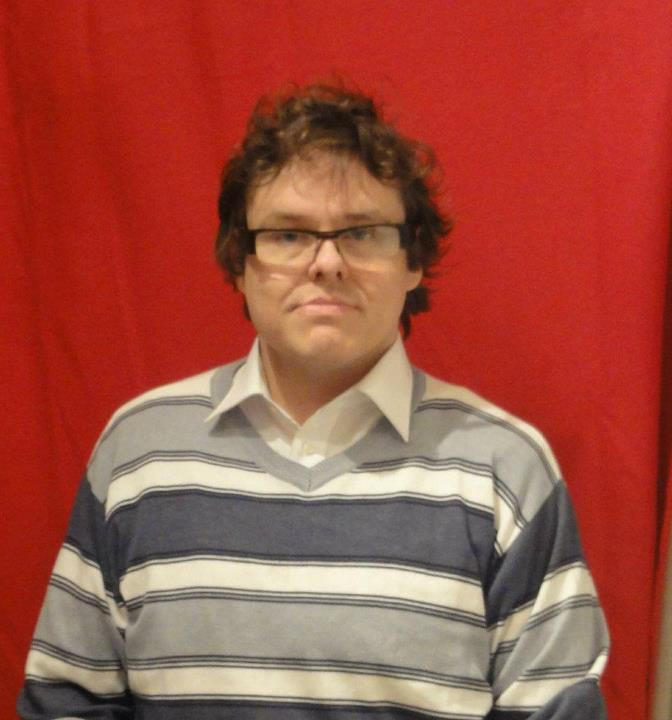 martin palsmar 2011